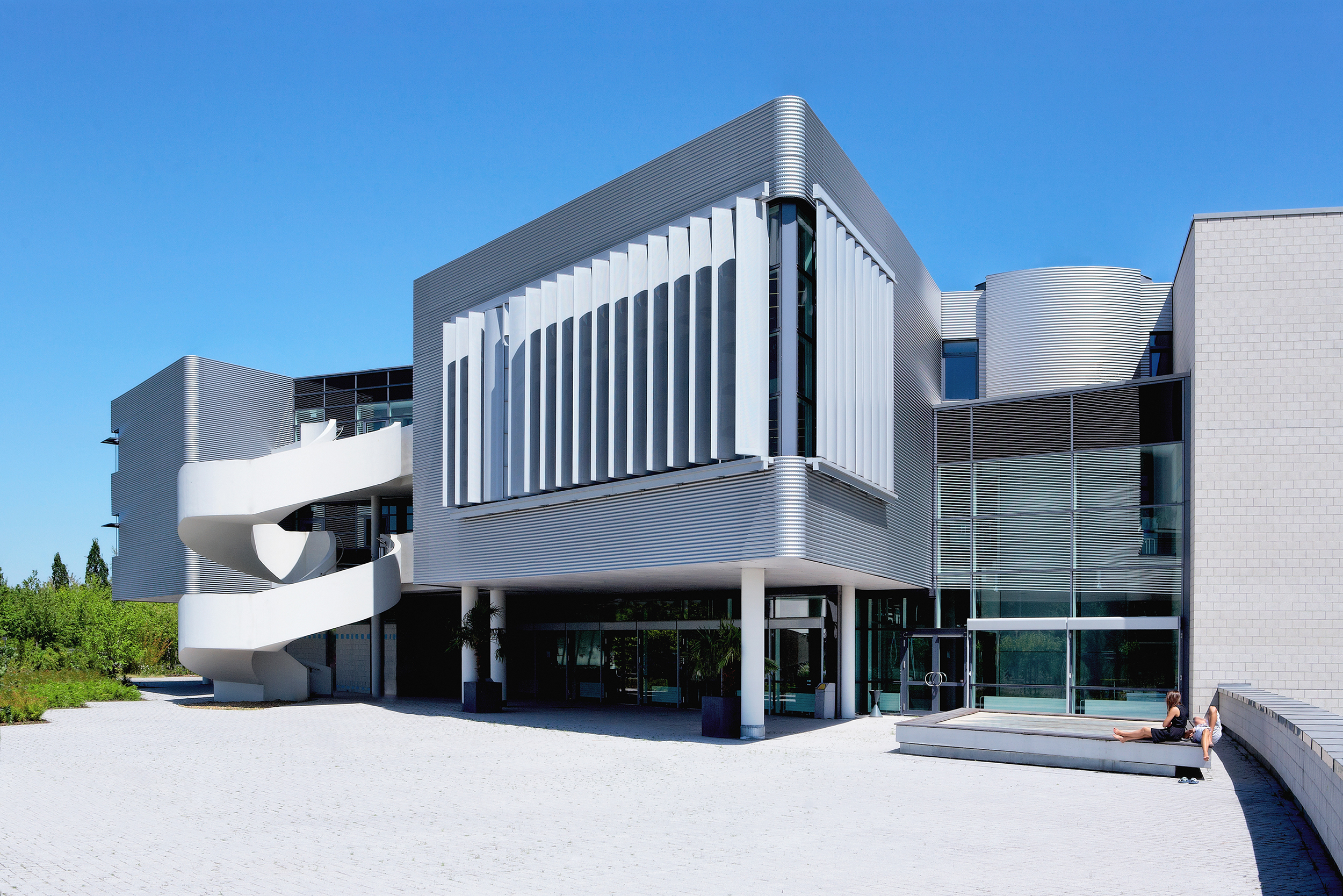 Moderne Architektur: Der RheinMoselCampus der Hochschule Koblenz